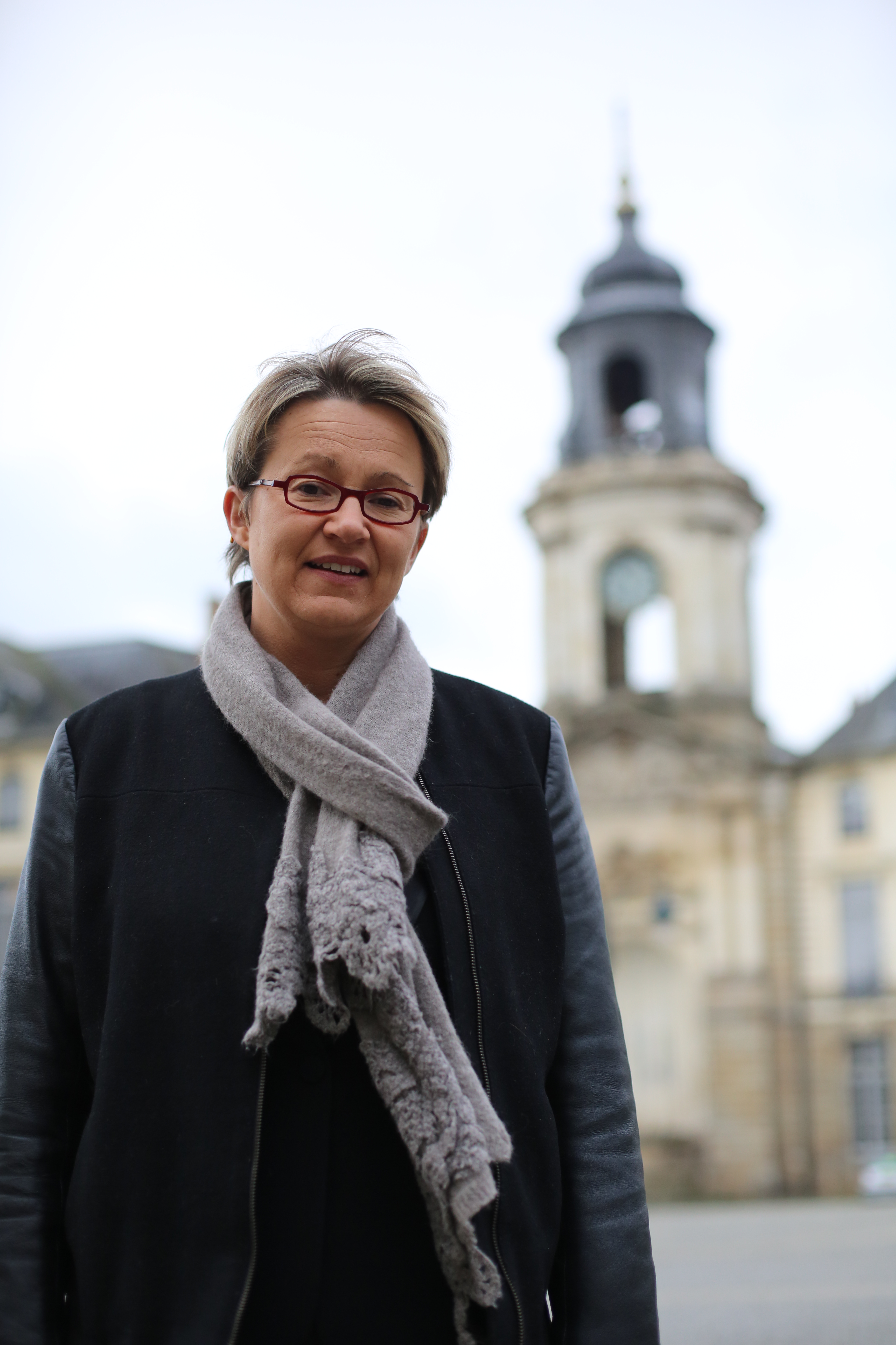 Nathalie Appéré, alors députée de la 2e circonscription d'Ille-et-Vilaine, et candidate PS à la mairie de Rennes